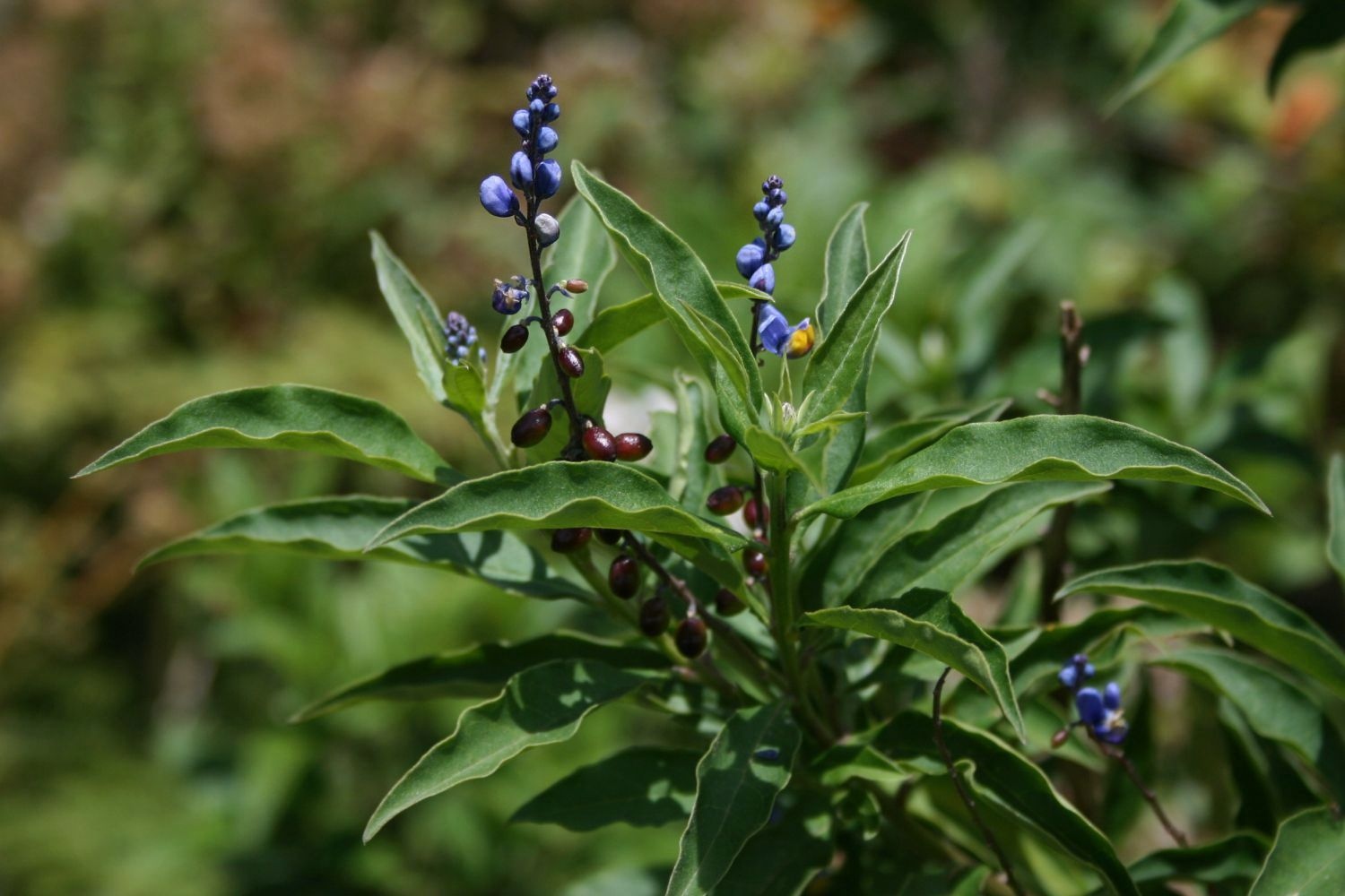 Monnina xalapensis s.lat. (incl. M. pittieri), Kreuzblumengewächse (Polygalaceae) - Costa Rica: Prov. Cartago, Cordillera de Talamanca, Carretera Interamericana, Macho Gaff, ca. 2450 m